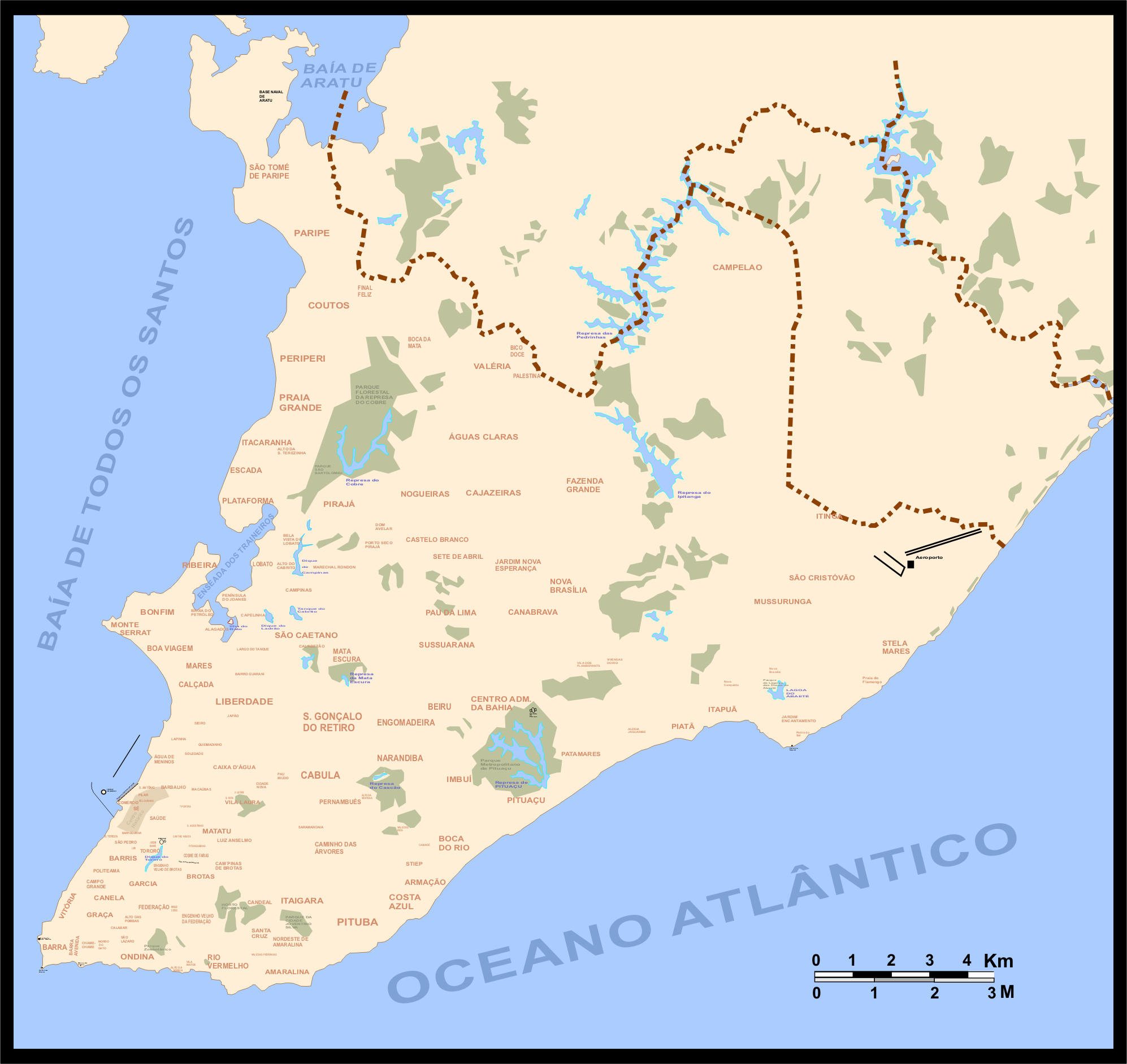 Mapa geral de Salvador (Bahia, Brazil), com nome e localização dos principais bairros.